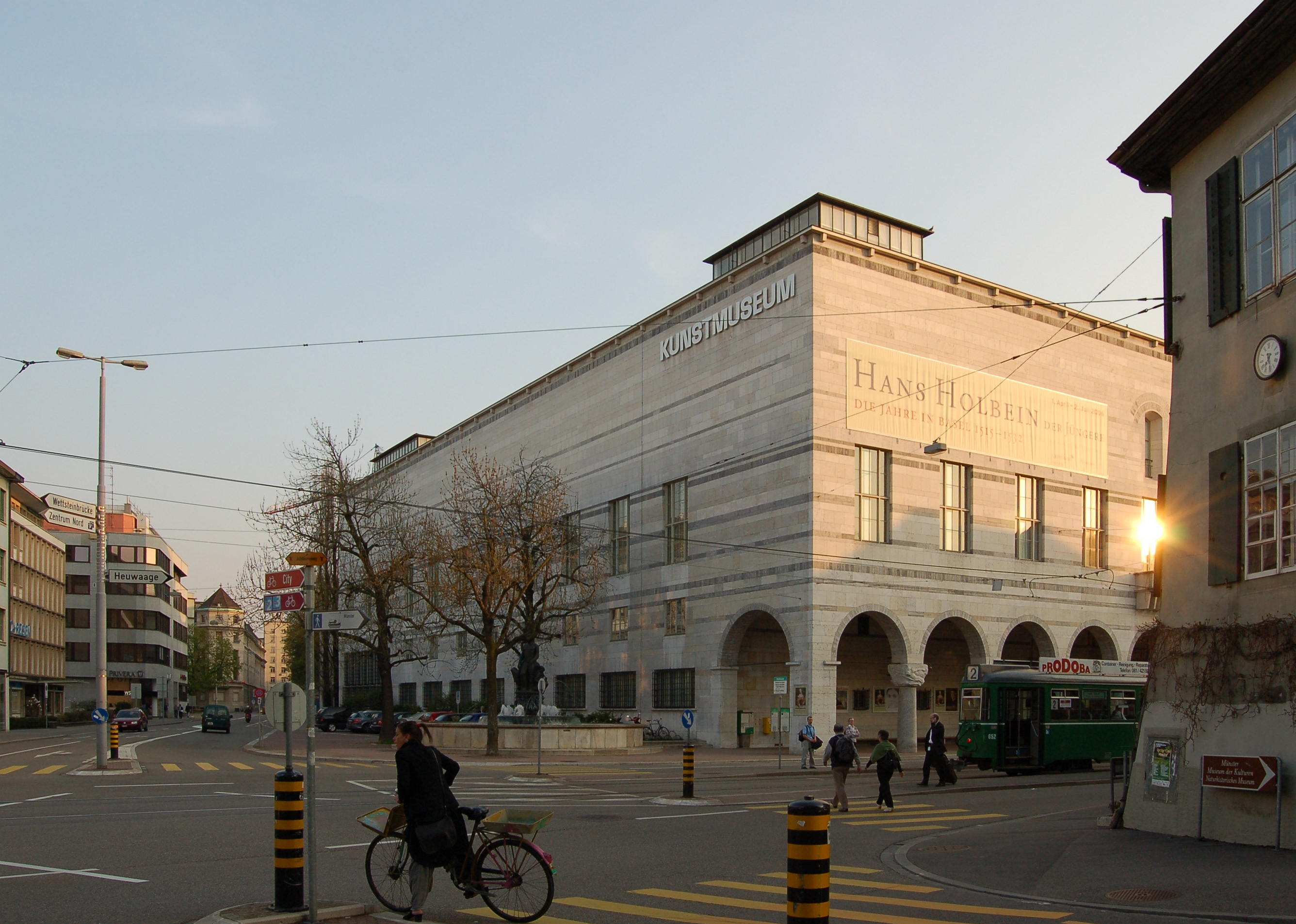 Gebäudes des Kunstmuseums Basel